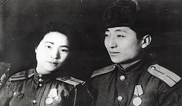 李敏与陈雷。